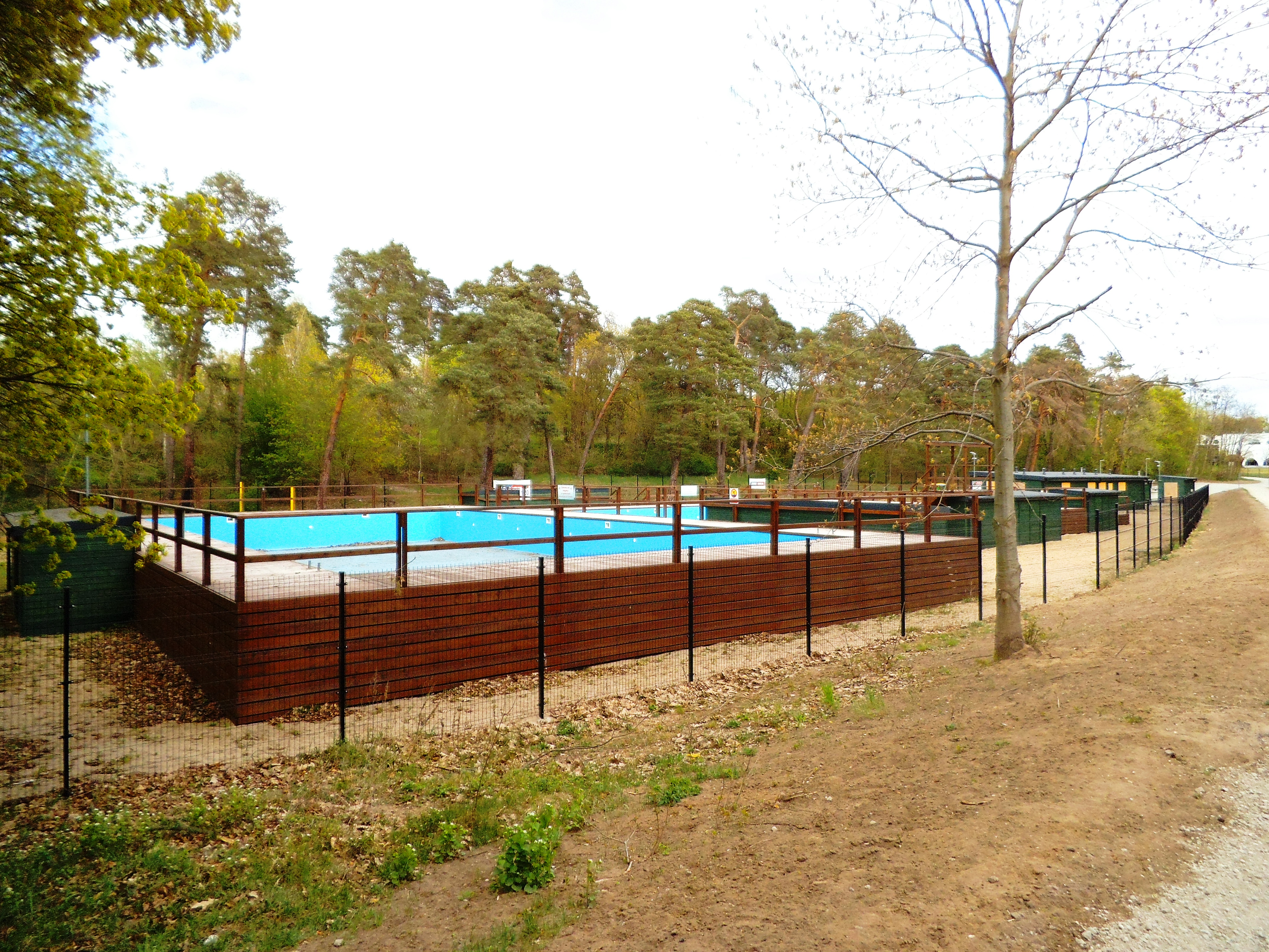 kompleks basenów letnich w Toruniu